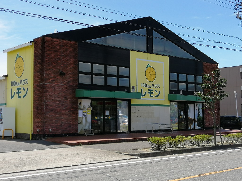 100えんハウスレモン